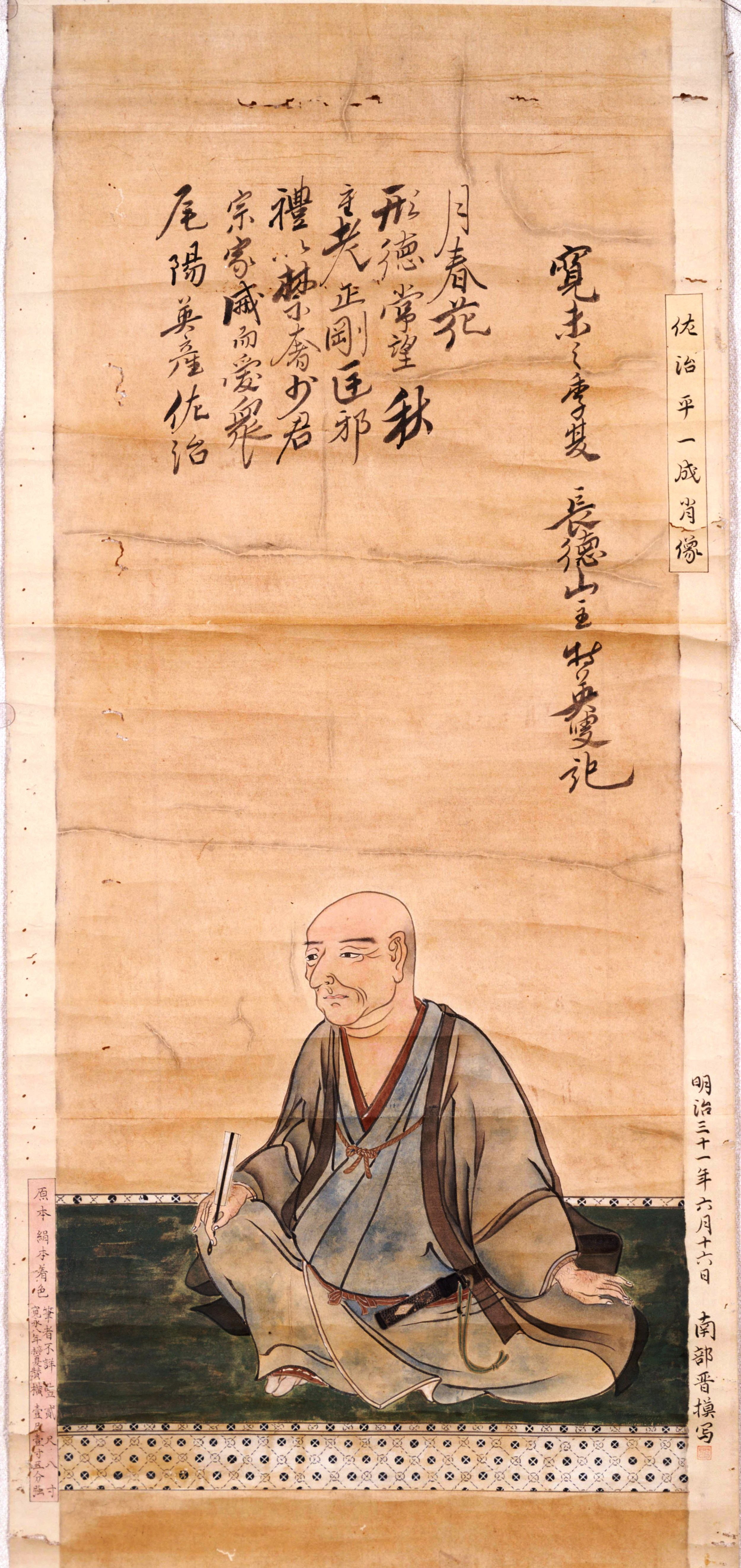 戦国・安土桃山期の日本の武将・佐治一成の肖像画（模写）